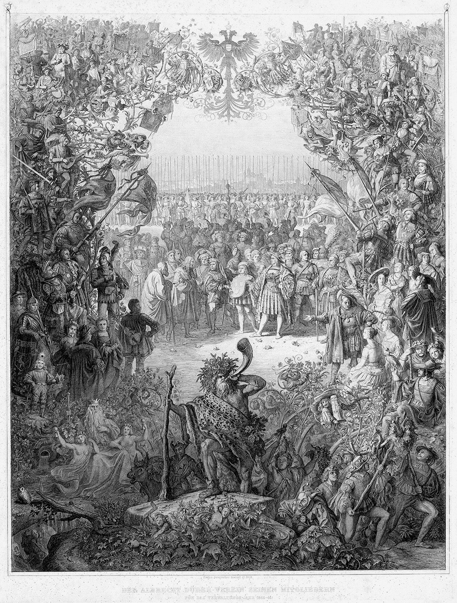 Die Verleihung des Künstlerwappens an Albrecht Dürer durch Kaiser Maximilian I. Radierung auf festem Velin. 58,1 x 44,3 cm. 1841. (Erinnerung an das Albrecht Dürer gewidmete Karnevalsfest der Münchner Künstler im Jahre 1840 mit Portraits zahlreicher Künstlerpersönlichkeiten)